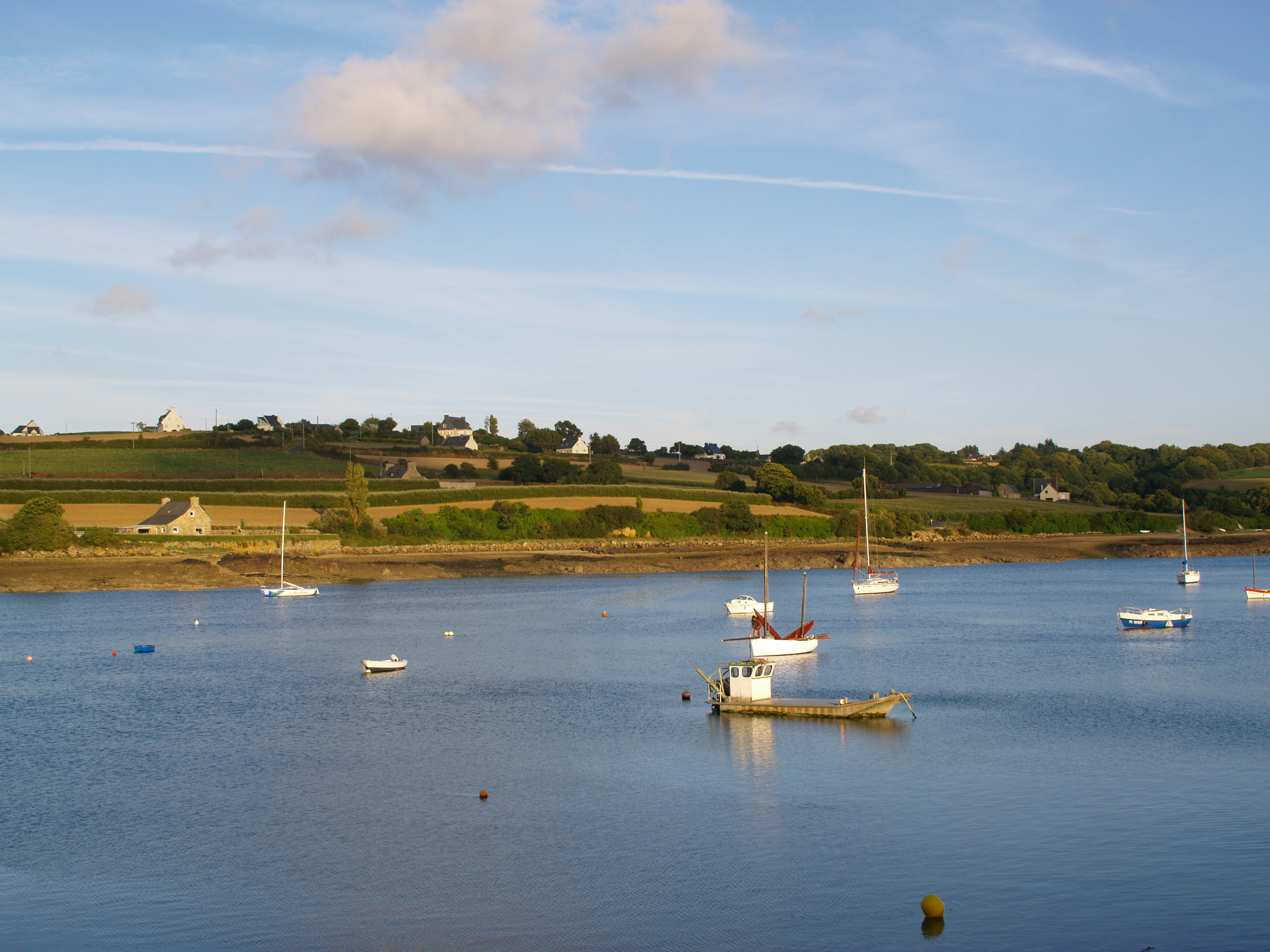 Le port de la Roche Jaune à Plouguiel (Bretagne, France)